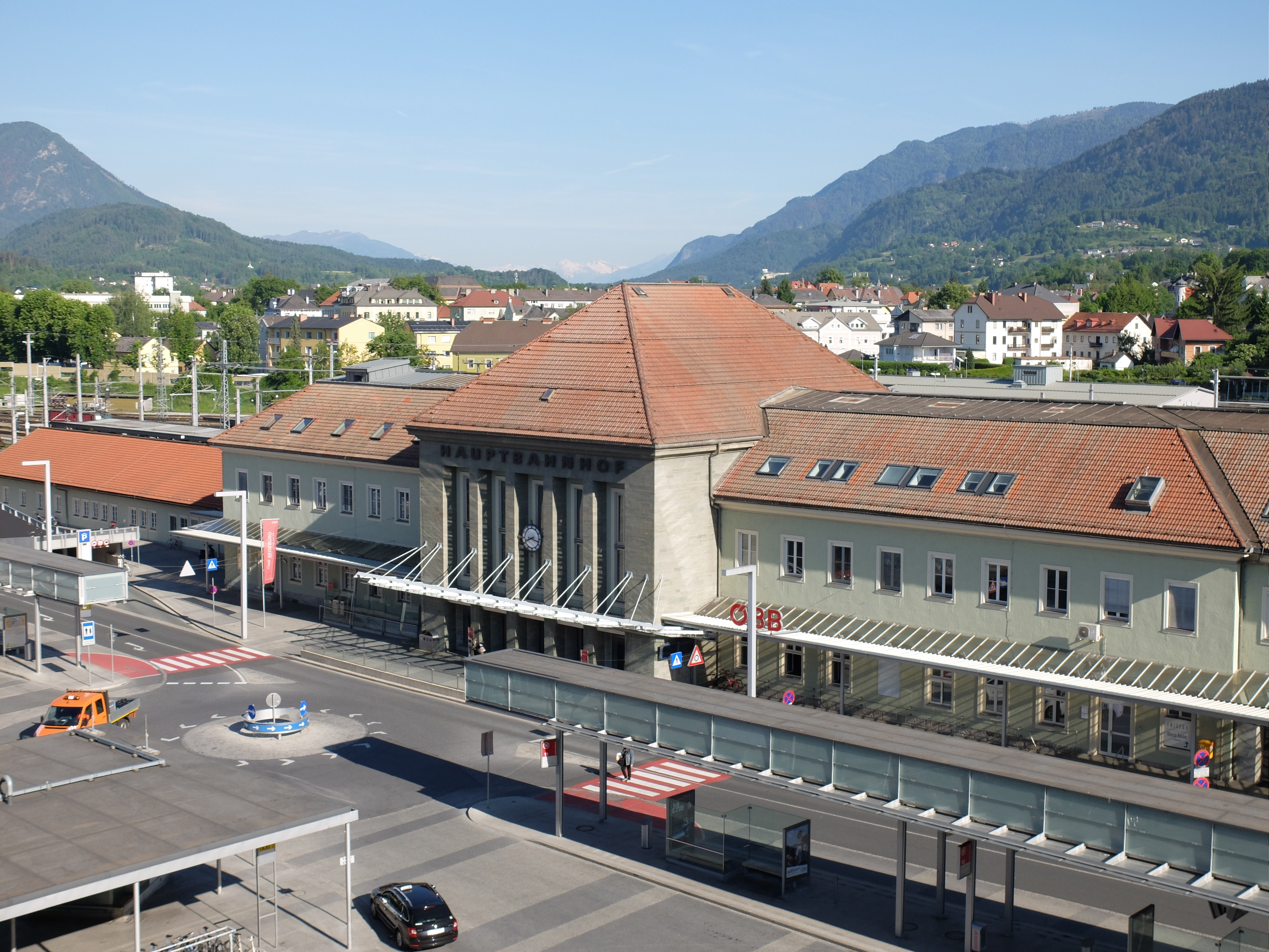 Villach Hbf